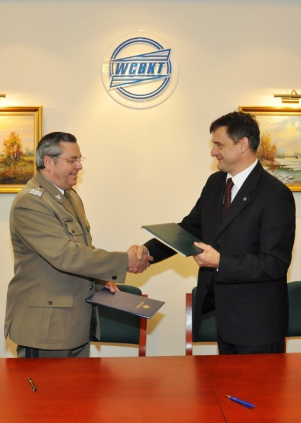 Podpisanie umowy z Rektorem Wojskowej Akademii Technicznej